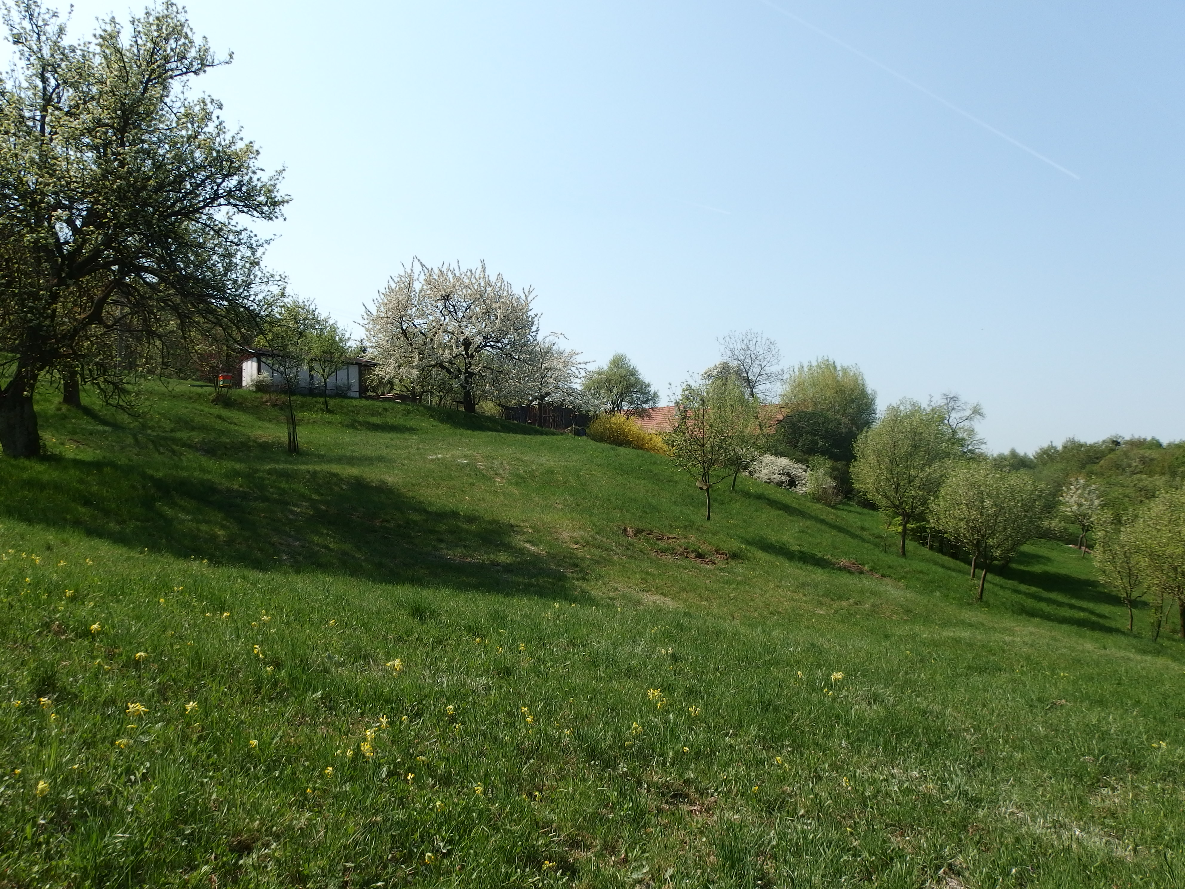 Stříbrnické paseky, okres Uherské Hradiště.